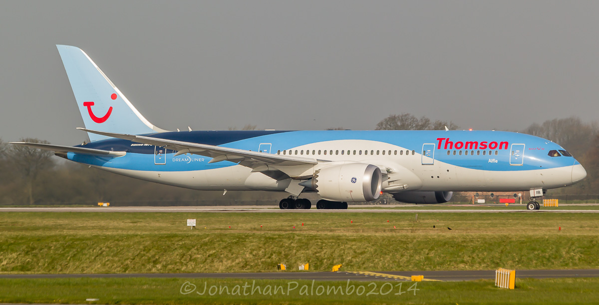 G-TUIB